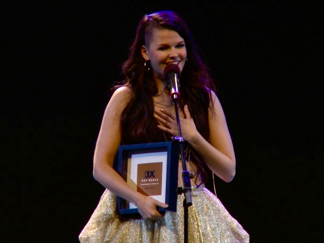 Saara Aalto voitti Vuoden homo -palkinnon QX Gay Gaalassa 2016.